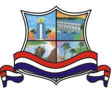 Escudo de Hernandarias (Paraguay).